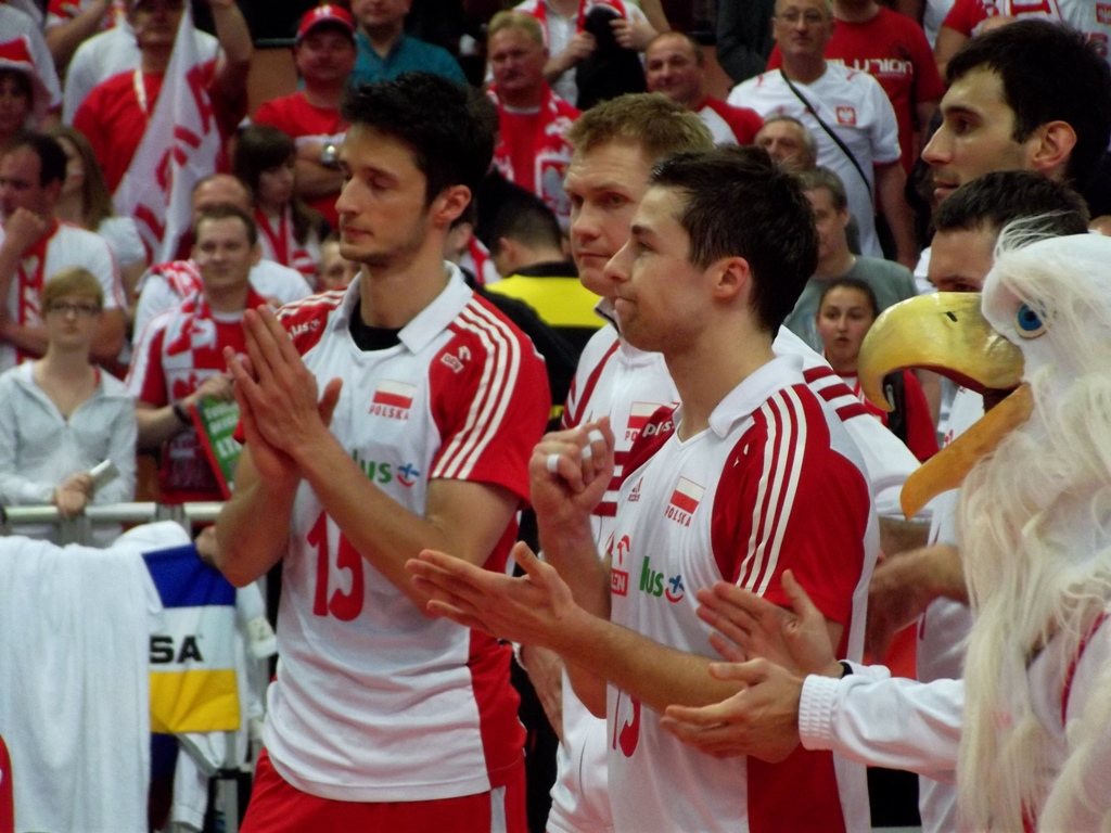 Zdjęcie zrobione podczas zawodów Ligi Światowej 2012 w katowickim Spodku.